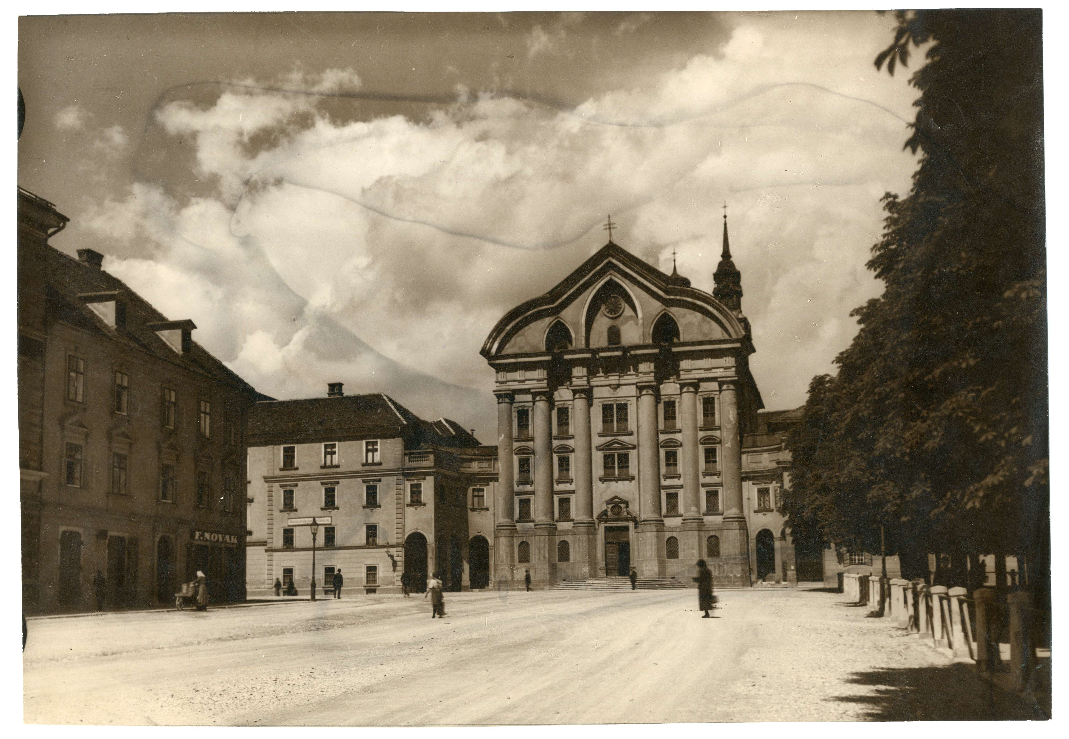 Uršulinska cerkev v Ljubljani.